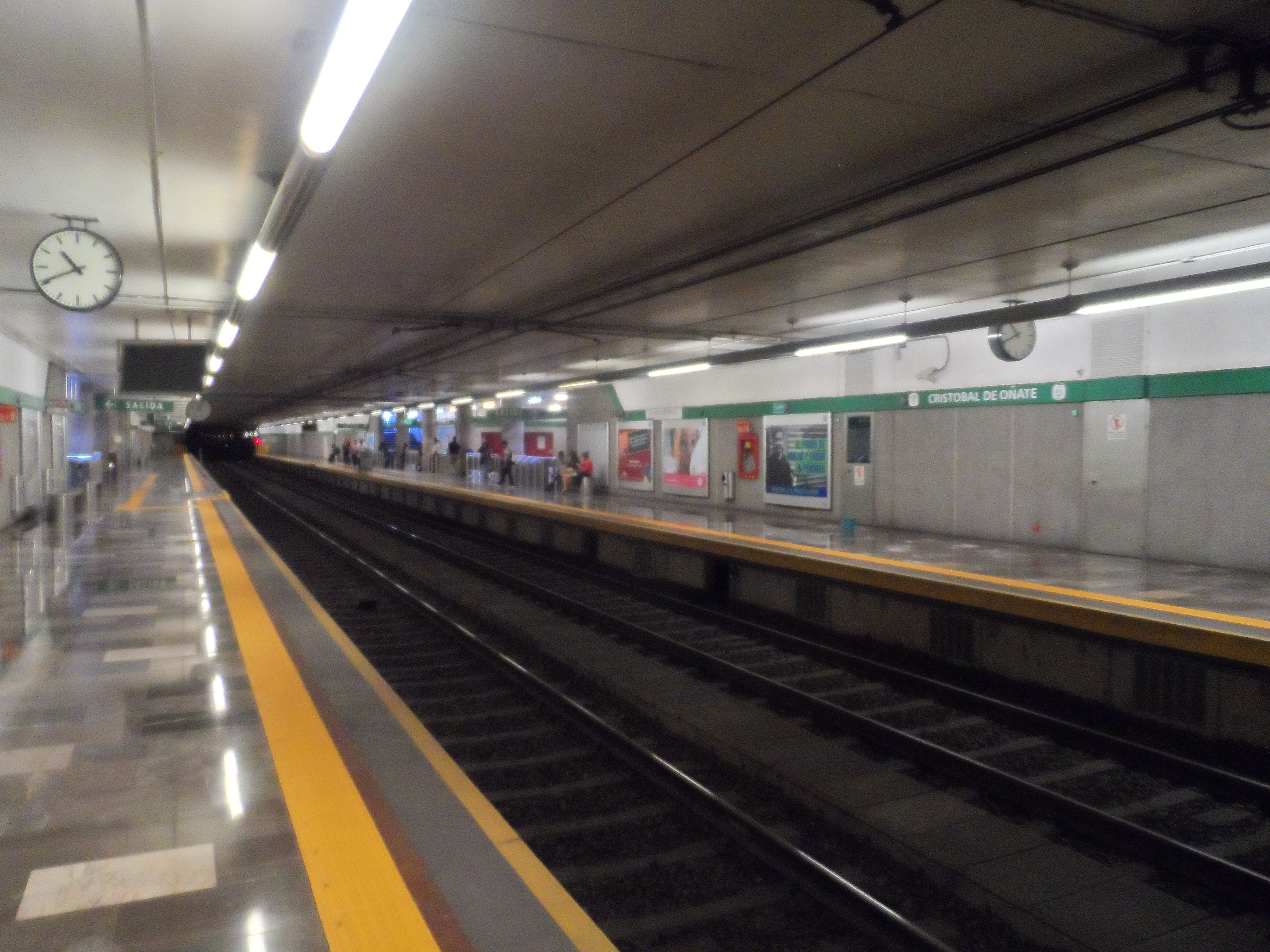 Andenes de la estación Cristóbal de Oñate de la Línea 2 del Tren Ligero de Guadalajara.